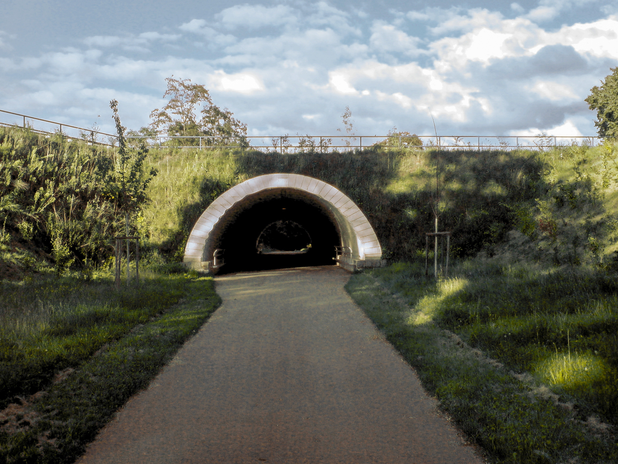 Neuer Tunnel zwischen Schönenberg und Elschbach